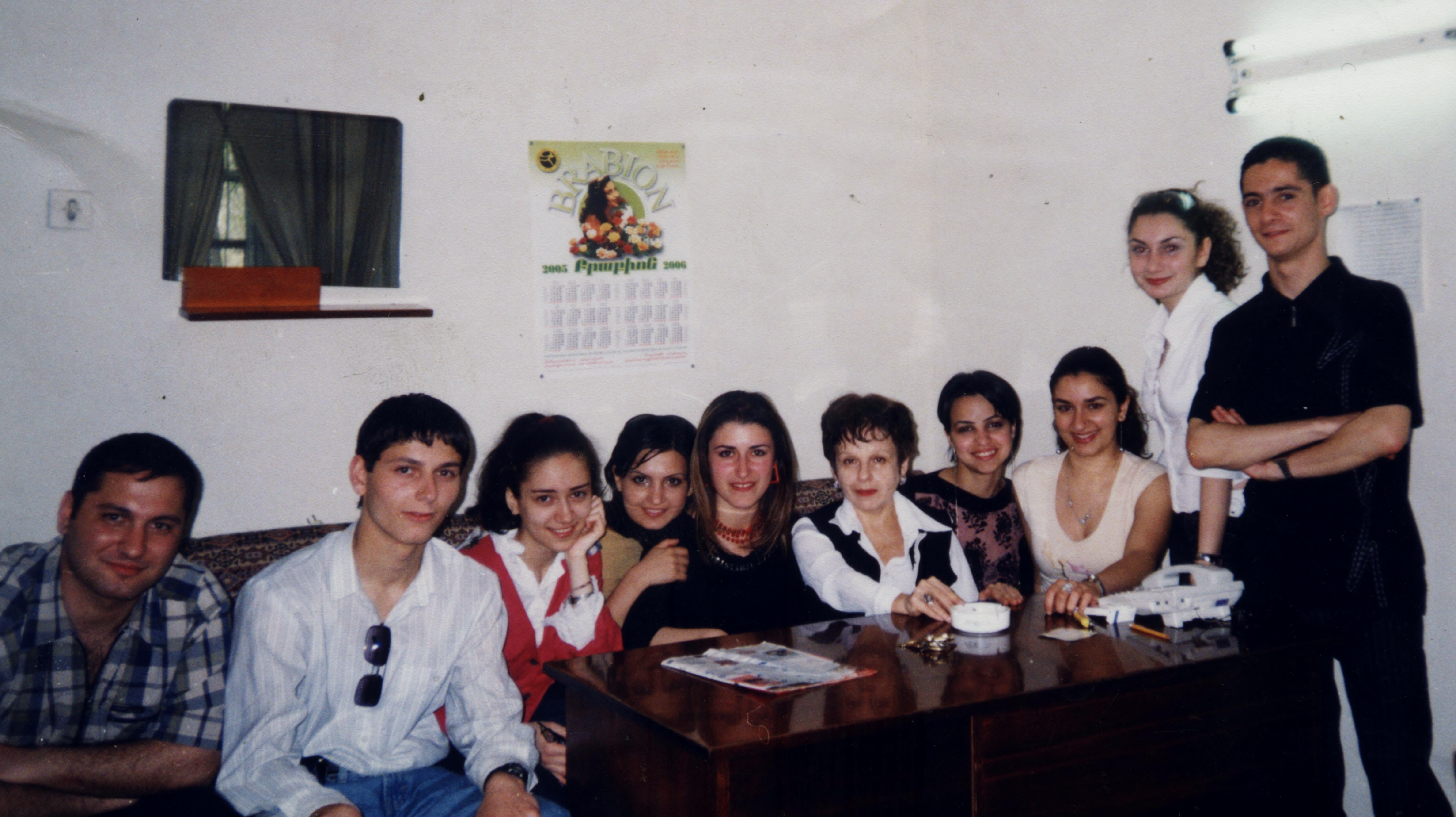 со студентами Ереванской государственной консерватории им. Комитаса, Ереван, 2008.